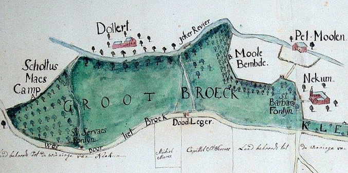 Detail van een kaart uit 1776 van het Sint-Servaasbroek in het Jekerdal bij Maastricht. Het bosachtige gebied van 15 bunder bestond uit het "Groot-Broeck" en het "Klein-Broeck", die als "gemende" (gemene grond) in gebruik waren. In de omgeving bevonden zich de Sint-Servaasbron, de Sint-Barbarabron, de watermolens Molen van Dollaert ("Dollert") en Nekummermolen ("Pel-Molen"), en de Hoeve Nekum.